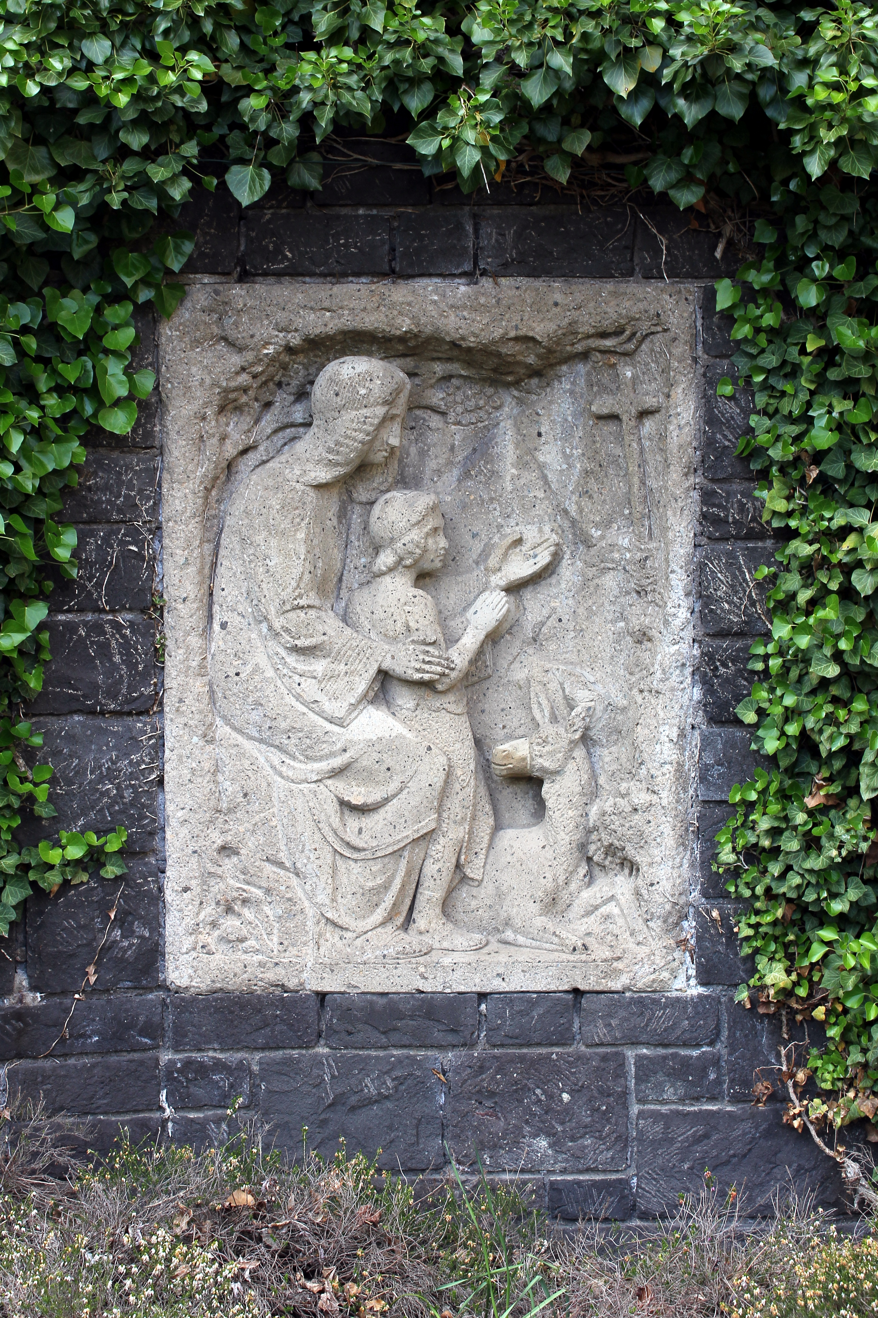 Szene aus der Legende um Genoveva von Brabant: Genoveva mit ihrem Sohn und der Hirschkuh, mit deren Milch sie das Kind ernährte, als sie in eine Höhle geflohen war und mehrere Jahre dort lebte. Relief in Maria Laach von Bruder Reinhold Teutenberg (1864–1935)